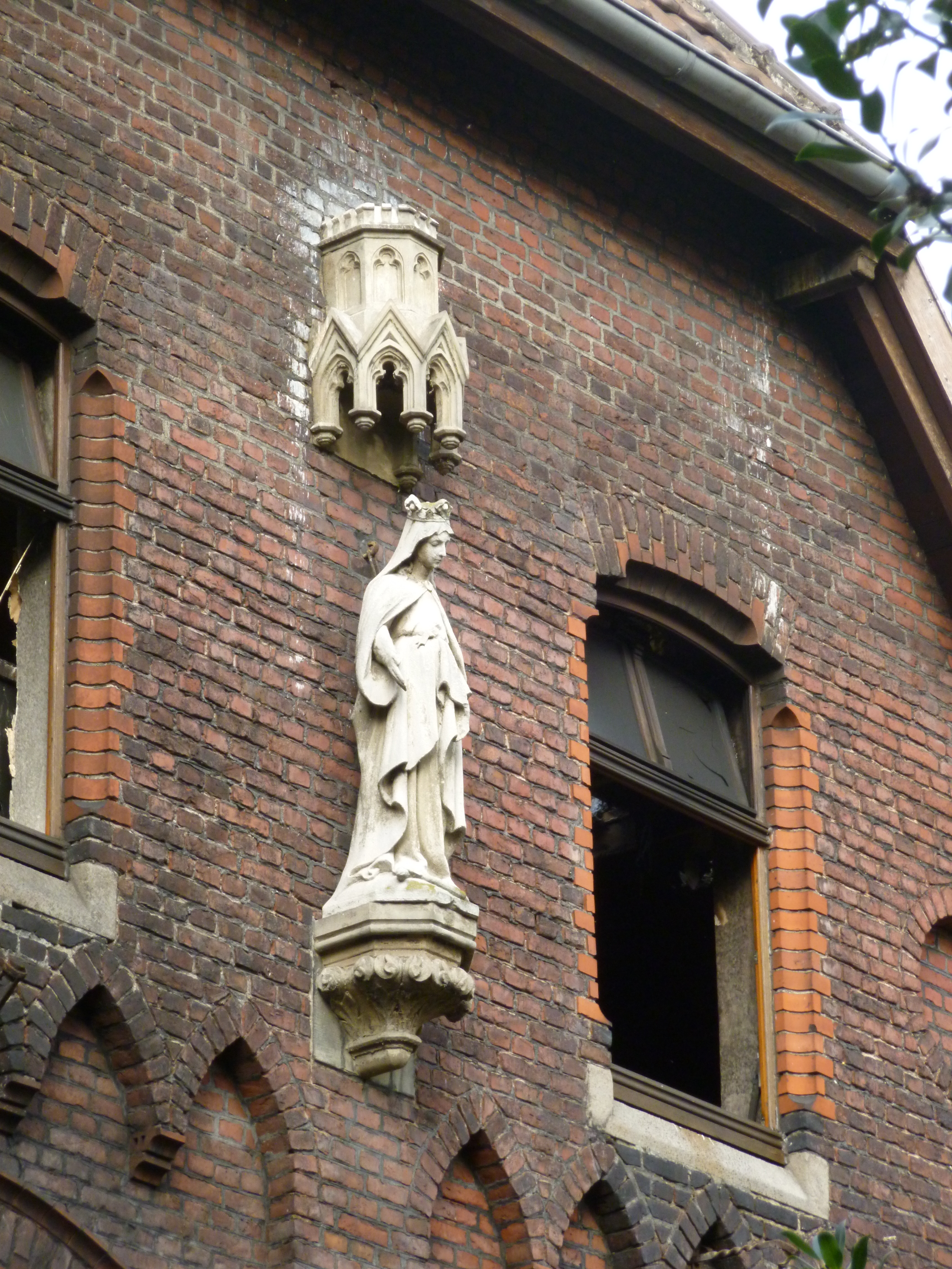 Ehemaliges Pfarrhaus St. Marien in Herne-Eickel nach dem Brand im Oktober 2016, gesehen von der Herzogstraße in Höhe Hausnummer 10, Blick auf Detail der Rückfront